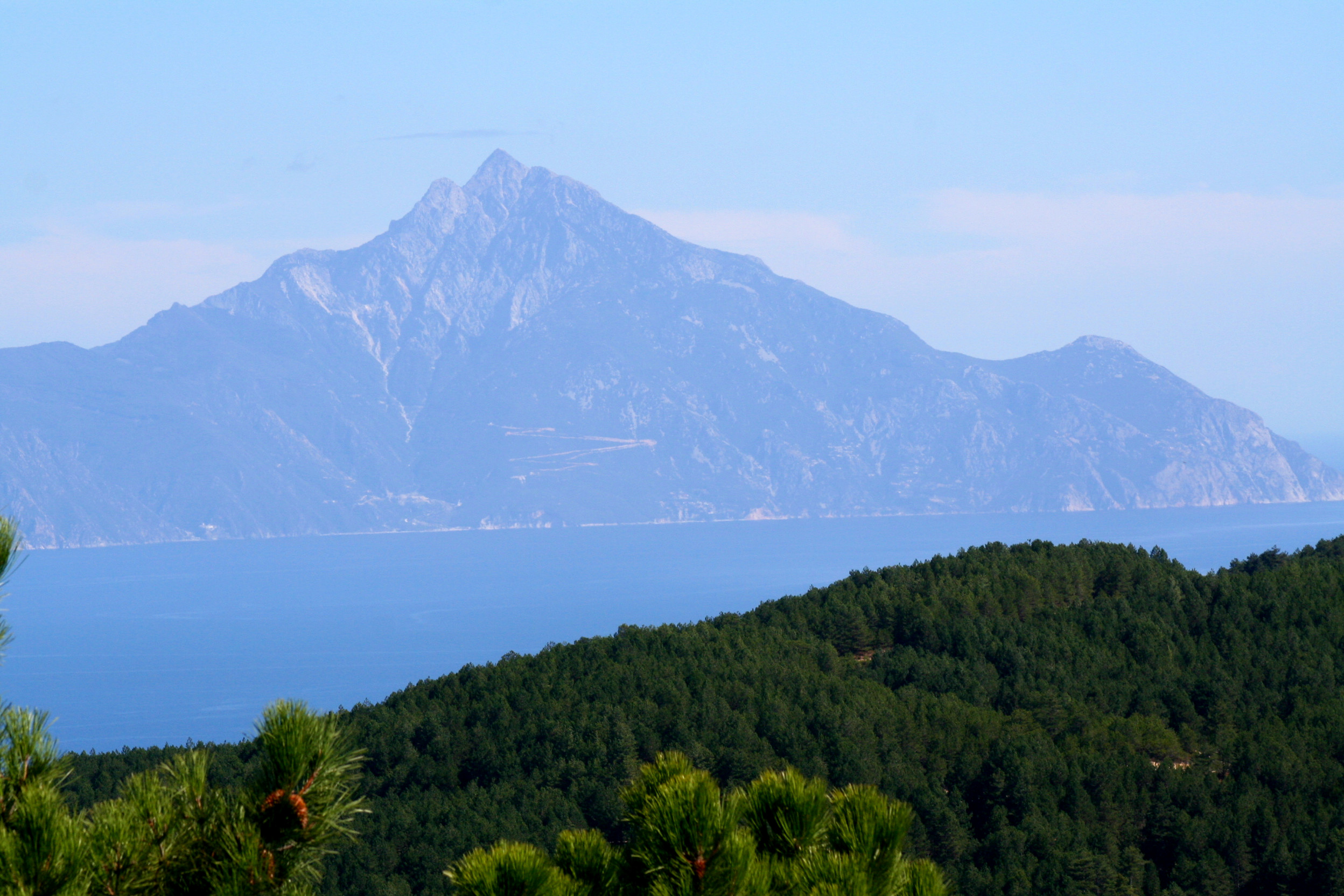 Berg Athos, vom Berg Itamos aus gesehen.